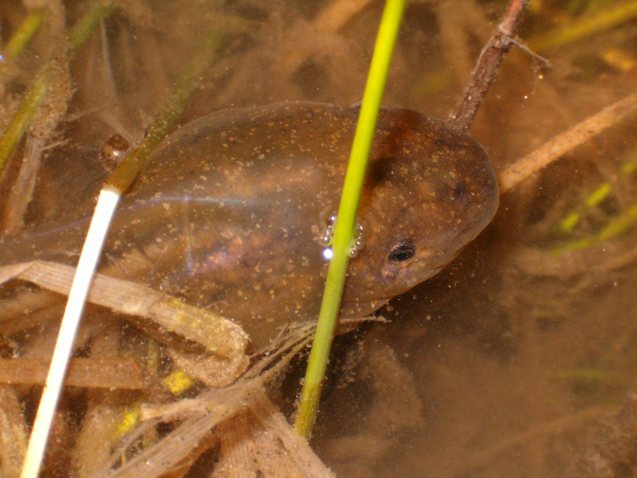 Tadpole of Pelobates cultripes 24 March 2006 - 23h30 Notre-Dame-de-Londres - Hérault - France By David Delon